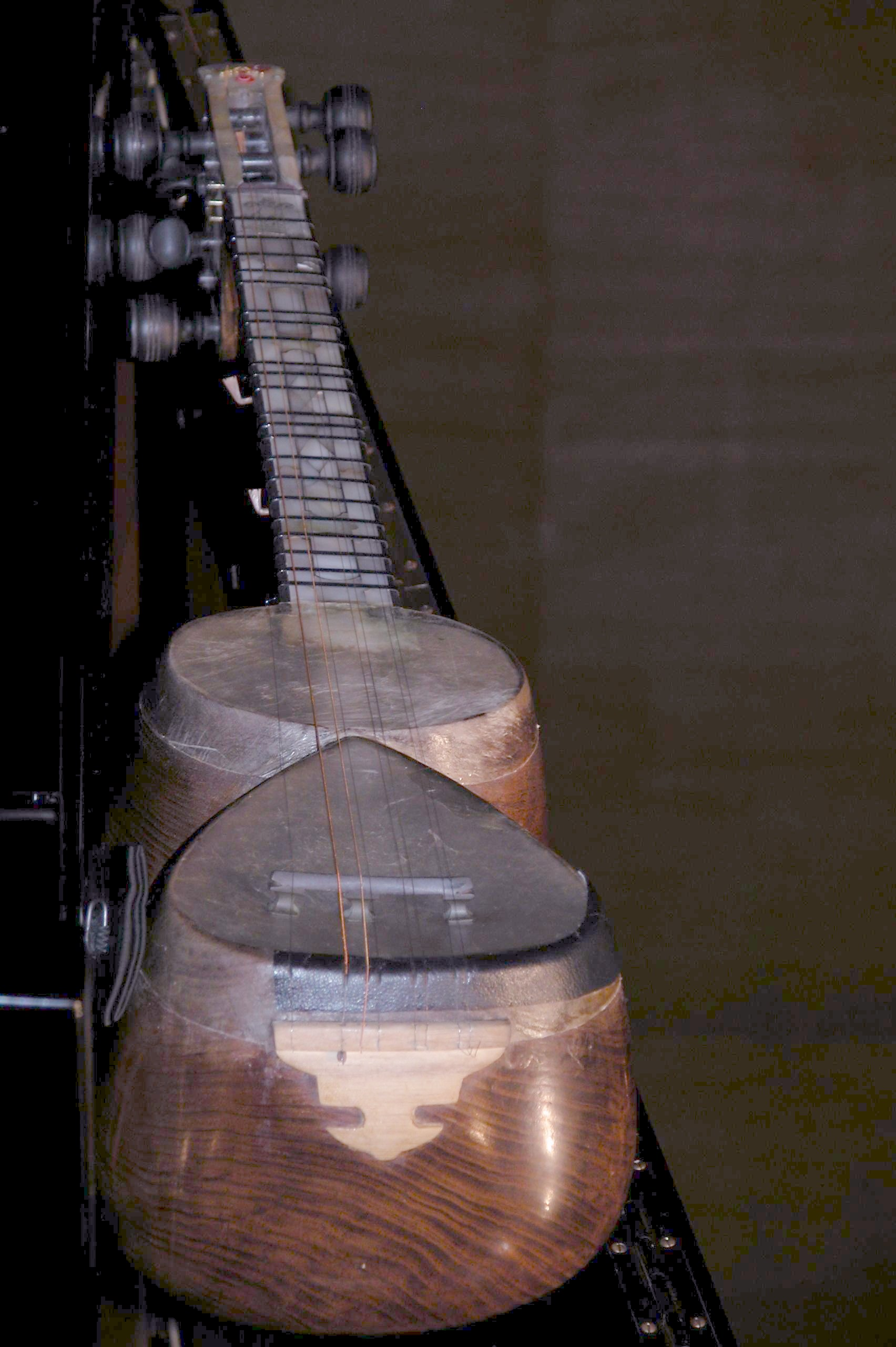 Azerbaycan Tar'ı